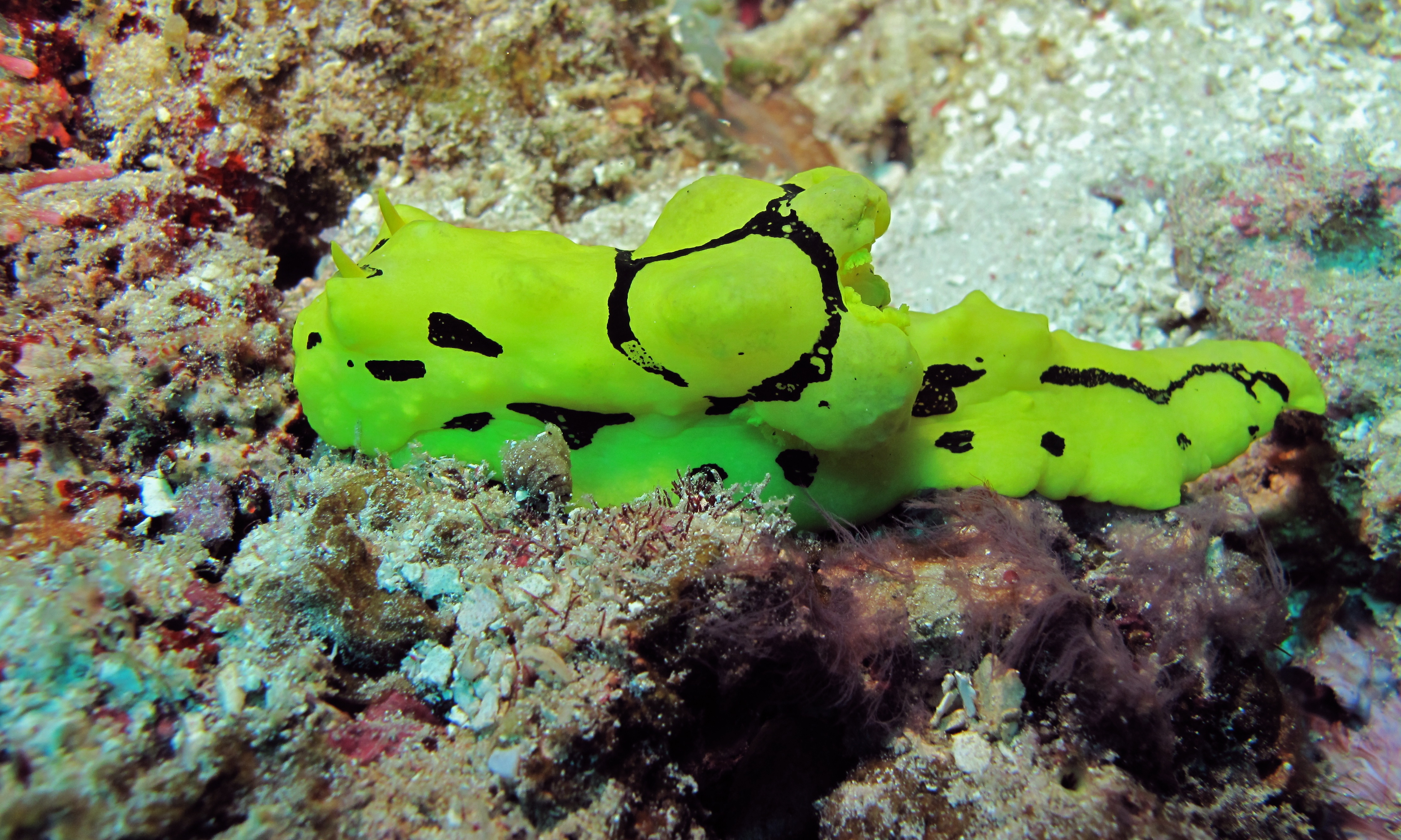 Notodoris minor Eliot, 1904 ; Green Marker, Pulau Bohayan, Sabah, MALAYSIA